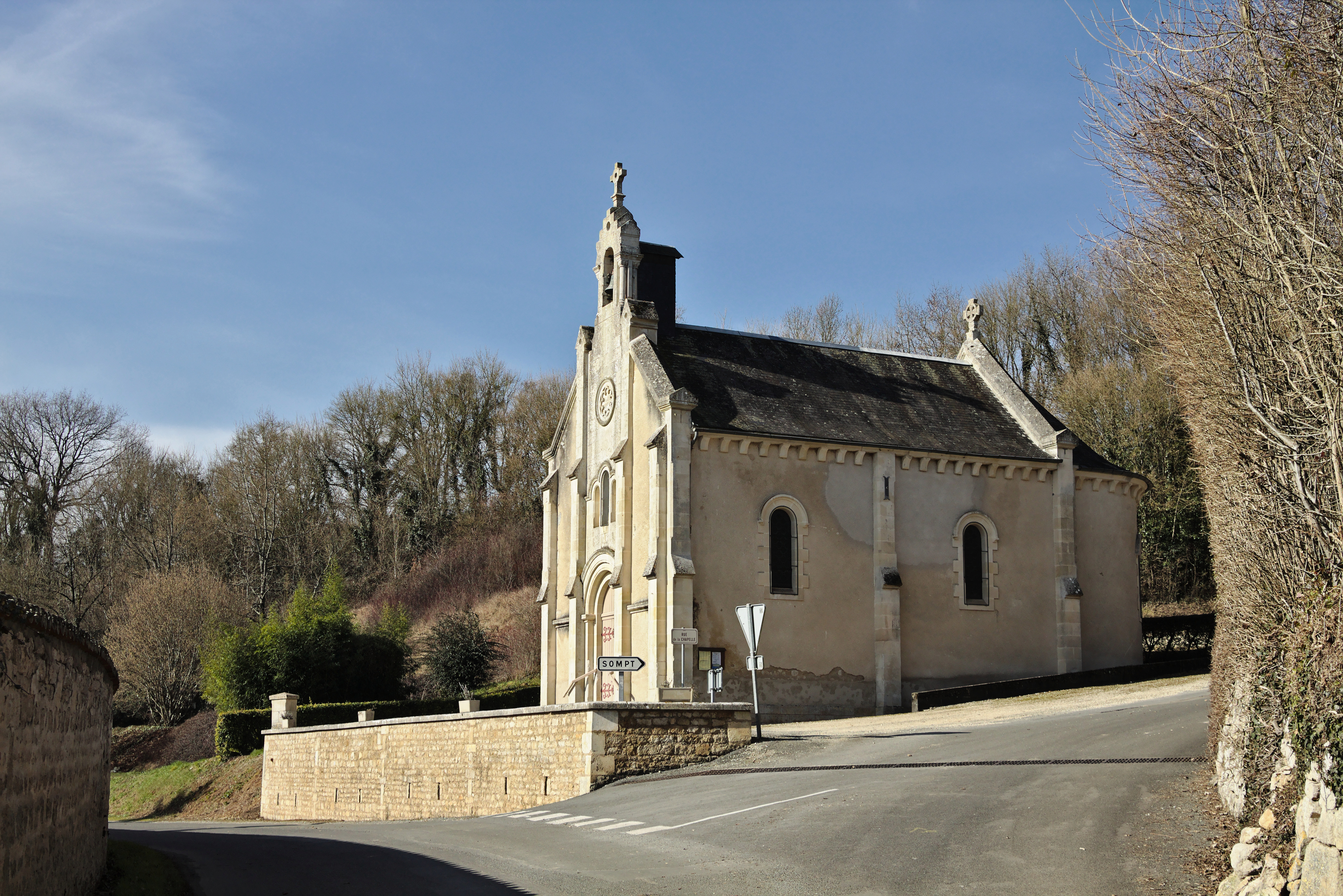 Chapelle Saint-Médard, Sompt, Deux-Sèvres, Poitou-Charentes, France